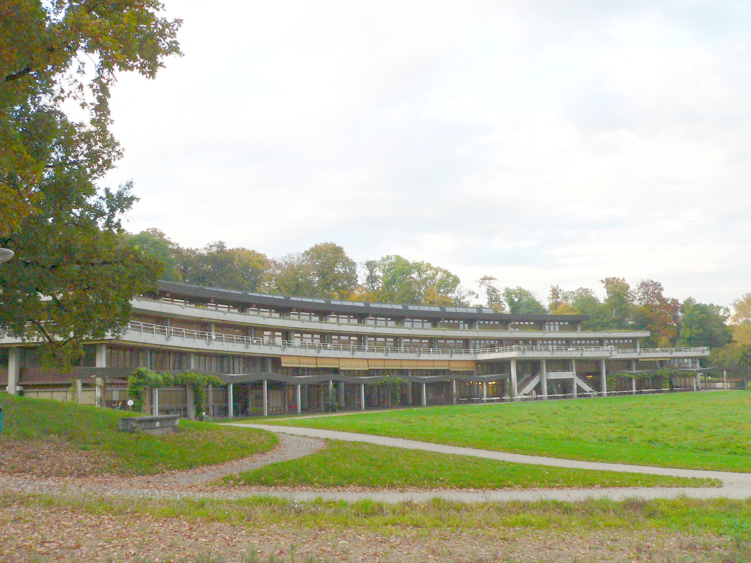 Le bâtiment Unithèque de l'Université de Lausanne (surnommé « la banane » en raison de sa corbure). À gauche, on aperçoit le Chêne de Napoléon.